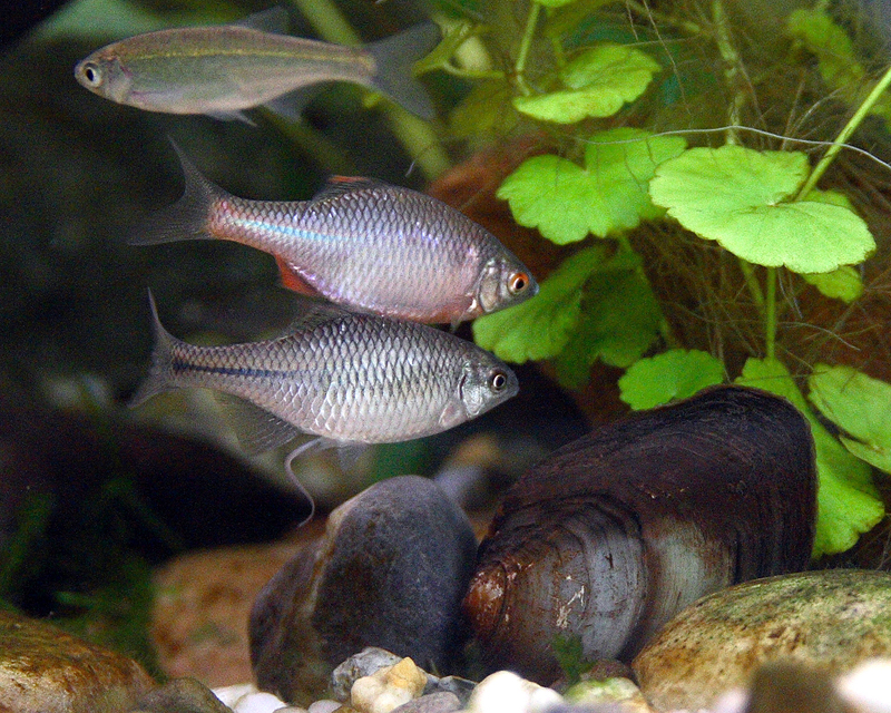 Para różanek (Rhodeus sericeus L.) przystępująca do tarła.